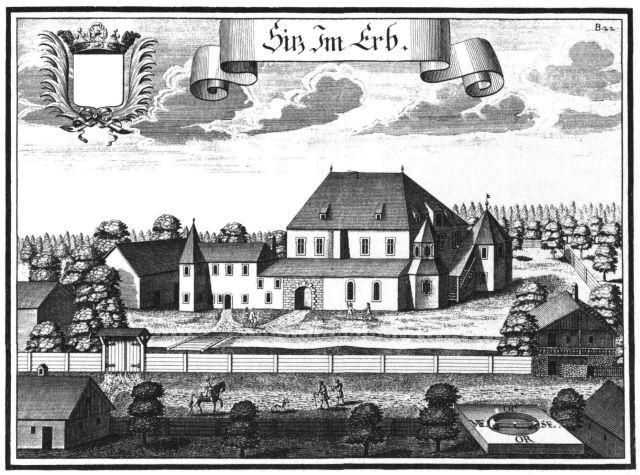 Schloss Erb